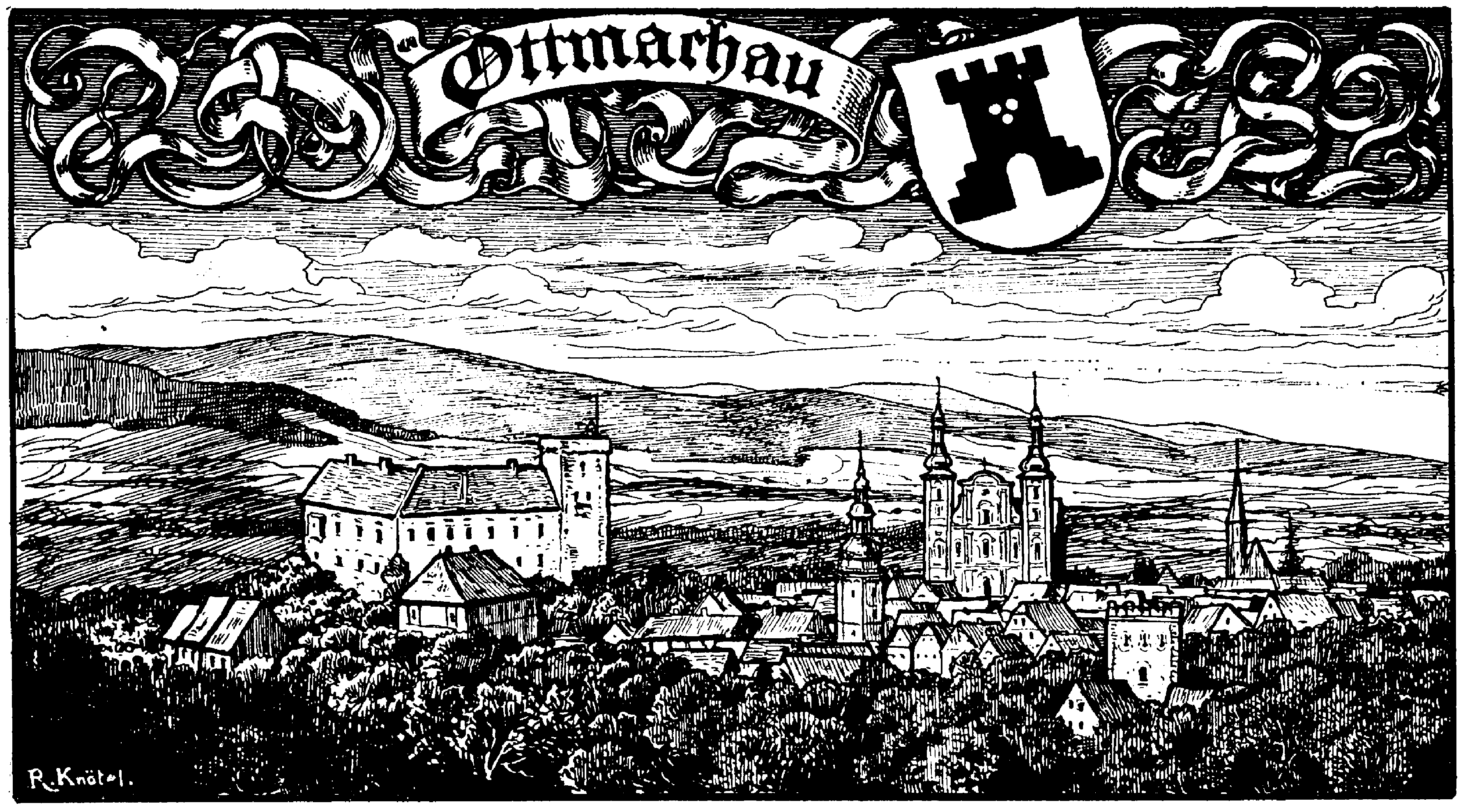 Panorama der Stadt Ottmachau in Oberschlesien mit Wappen. Von Richard Knötel (1857–1914)